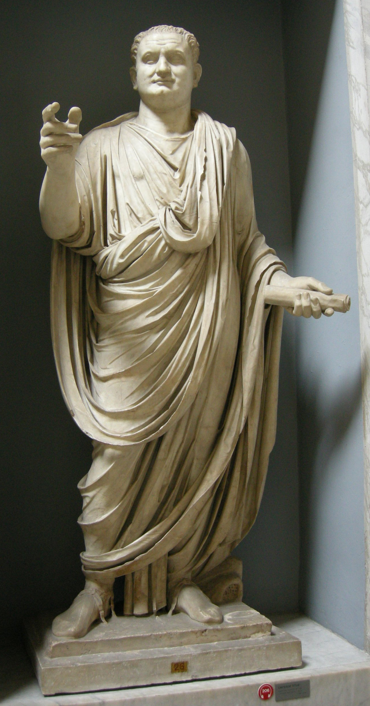 Tito, da vicinanze del battistero lateranense, inv. 2282. Museo Chiaramonti.